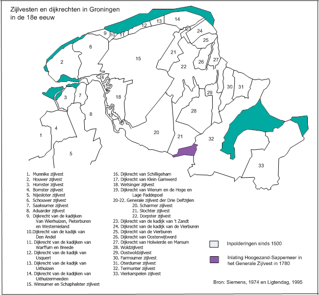 Kaart met de omvang van zijlvesten en dijkrechten in de provincie Groningen omstreeks 1750.